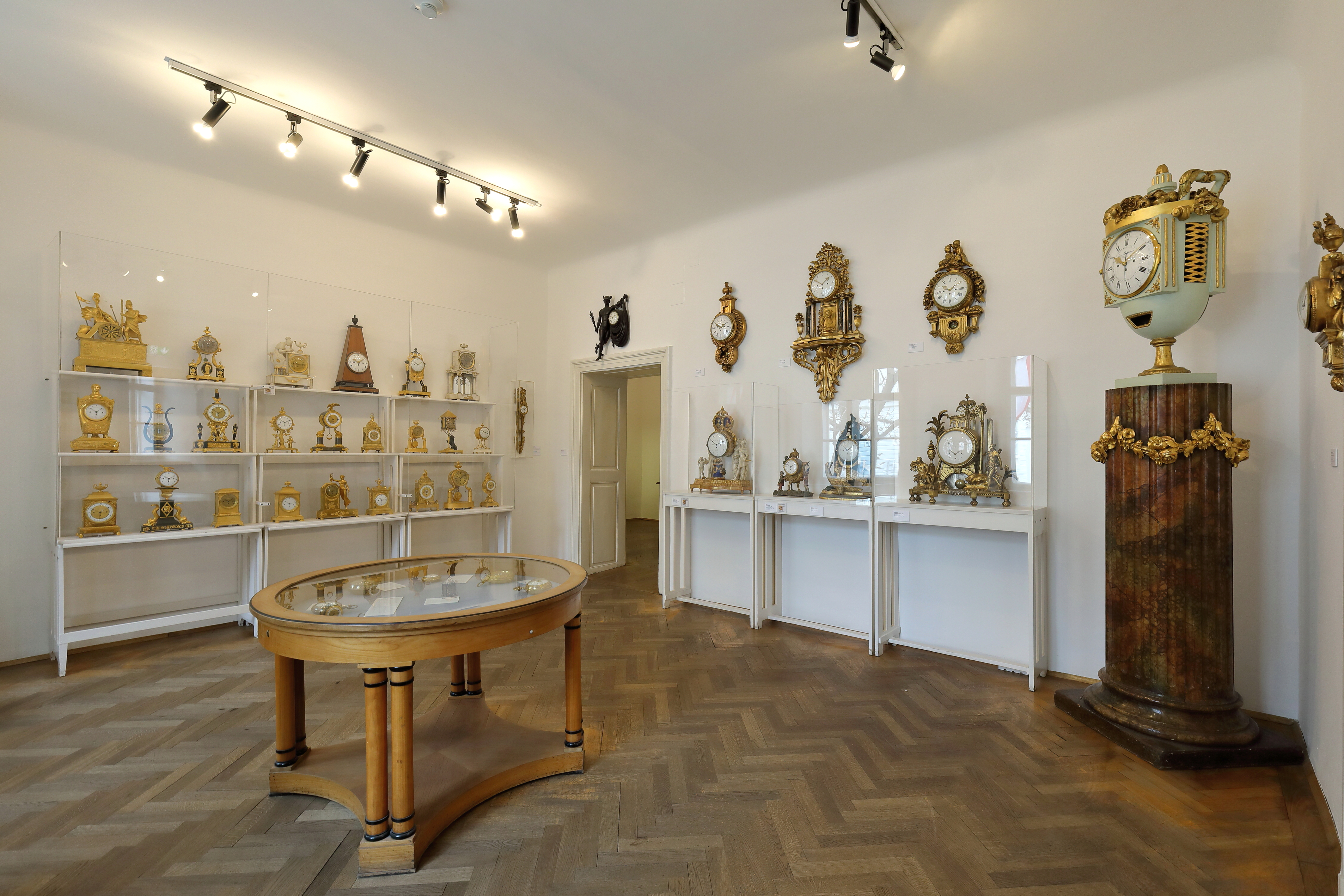 Raum Nr. 6 des Uhrenmuseums im 1. Wiener Gemeindebezirk Innere Stadt an der Adresse Schulhof 2.In einem der ältesten Häuser Wiens, dem Palais Obizzi, werden auf 3 Etagen rund 700 Uhren präsentiert. Das Museum wurde 1917 gegründet und geht im Wesentlichen auf die private Sammlung des Mittelschullehrers Rudolf Kaftan und auf die wertvolle Taschenuhrensammlung der Schriftstellerin Marie von Ebner-Eschenbach († 1916) zurück.